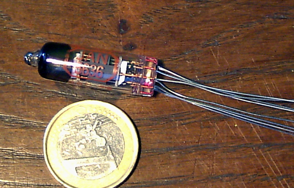 Pentodo 5636